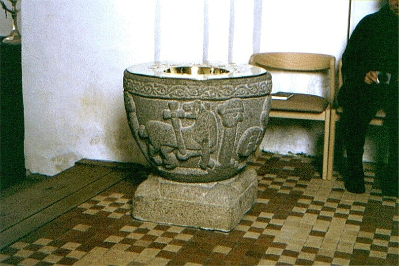 Gerning Kirke døbefont, Faurskov Kommune, Jylland, Denmark